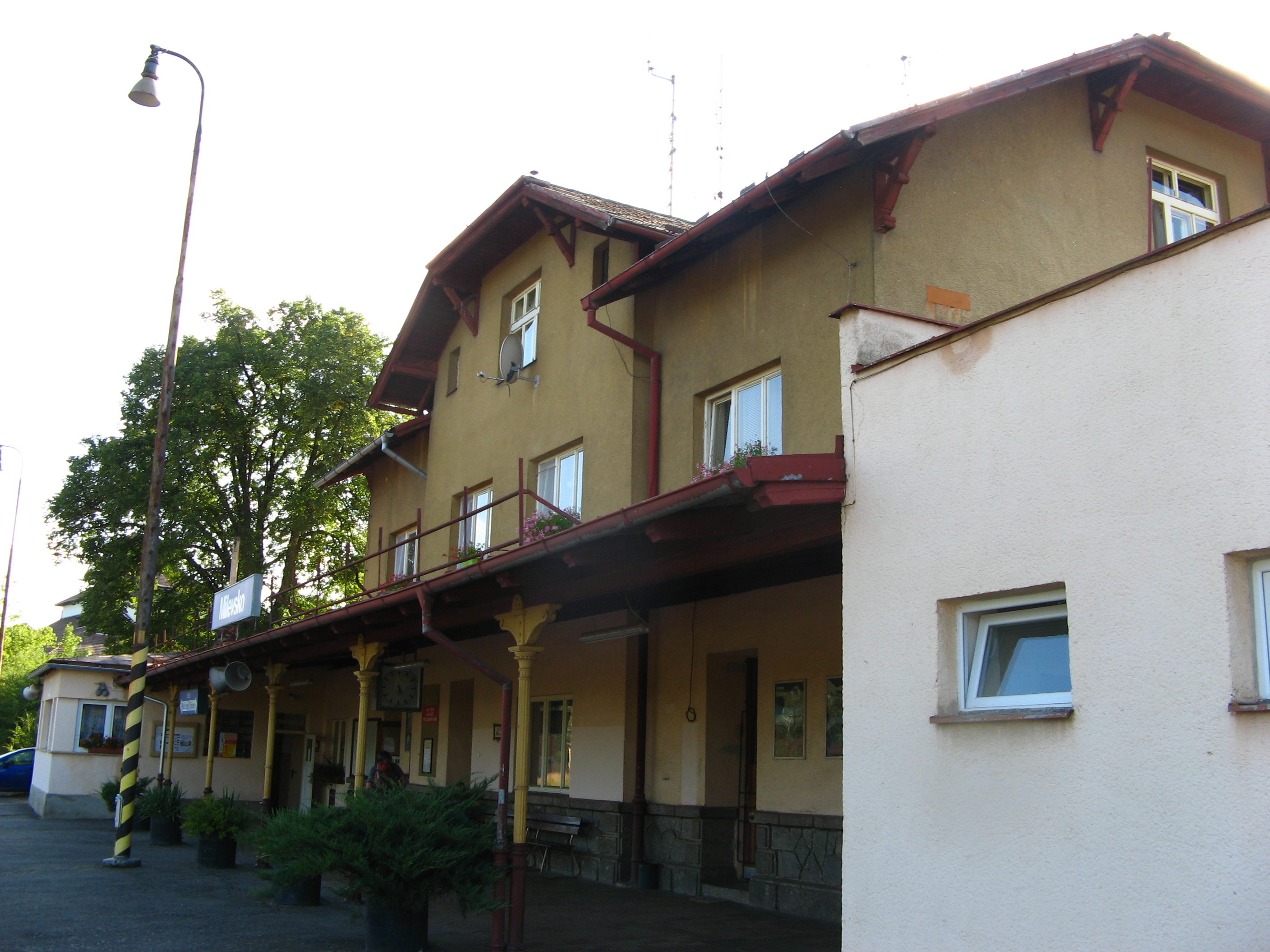 budova železniční stanice Milevsko